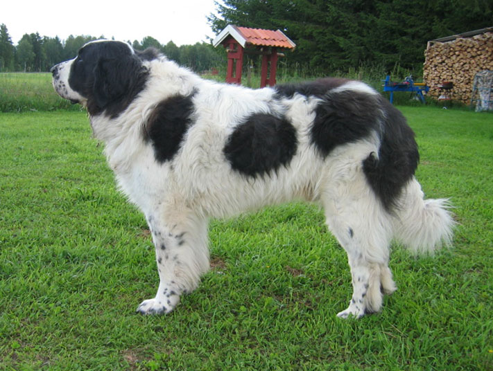 Mastín del Pirineo «Ojinegra`s Ante Del Astro» (male), Photo by Strignert Patrik, Sweden